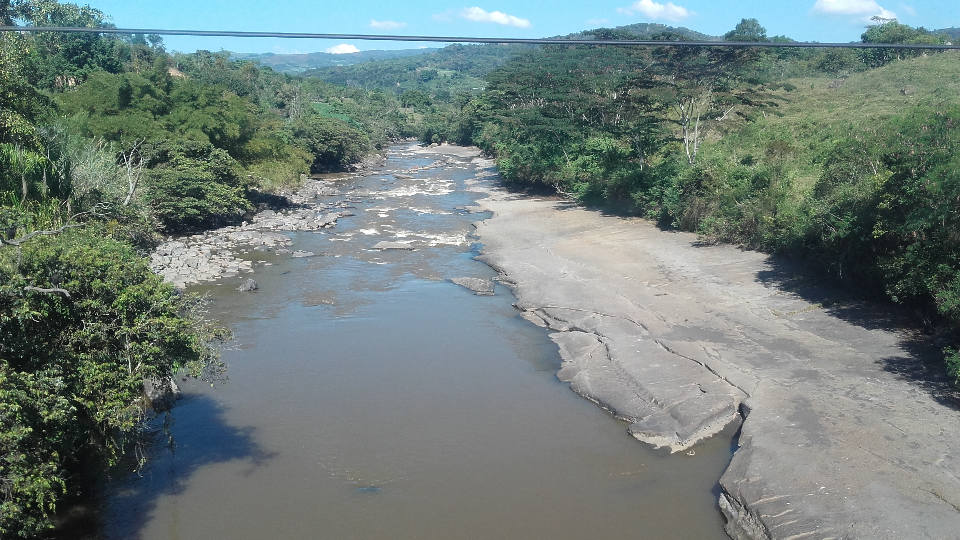 dnfnfnngngn